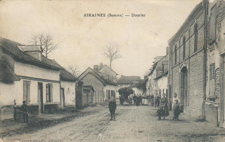 Hameau de Dourier, à Airaines (Somme, Picardie, France) - (Carte postale ancienne : avant 1914) - Photographiée ou scannée par Paul VASSEUR et communiquée pour publication à Marc ROUSSEL (Markus3).